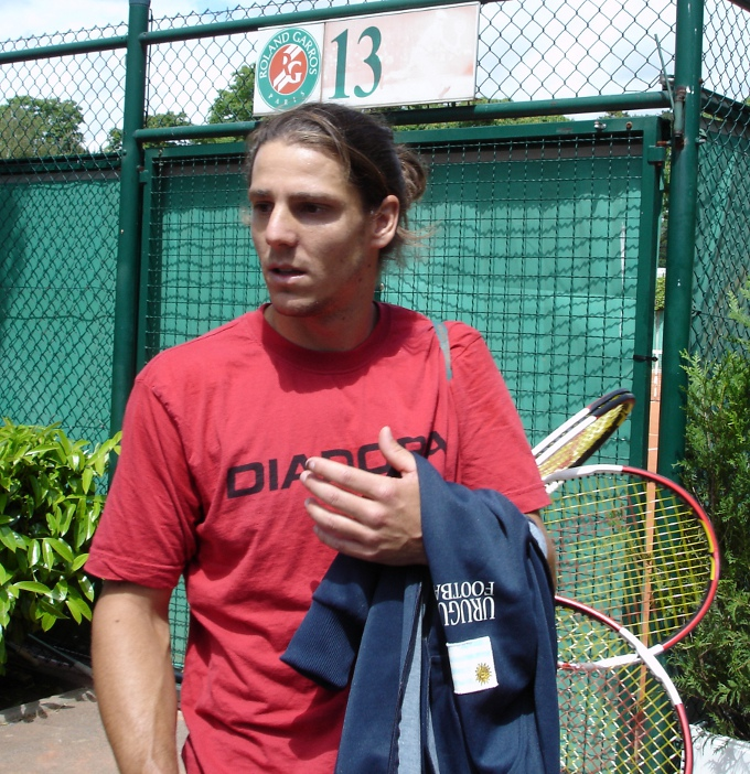 Gaston Gaudio à Roland-Garros en 2005 après un entrainement